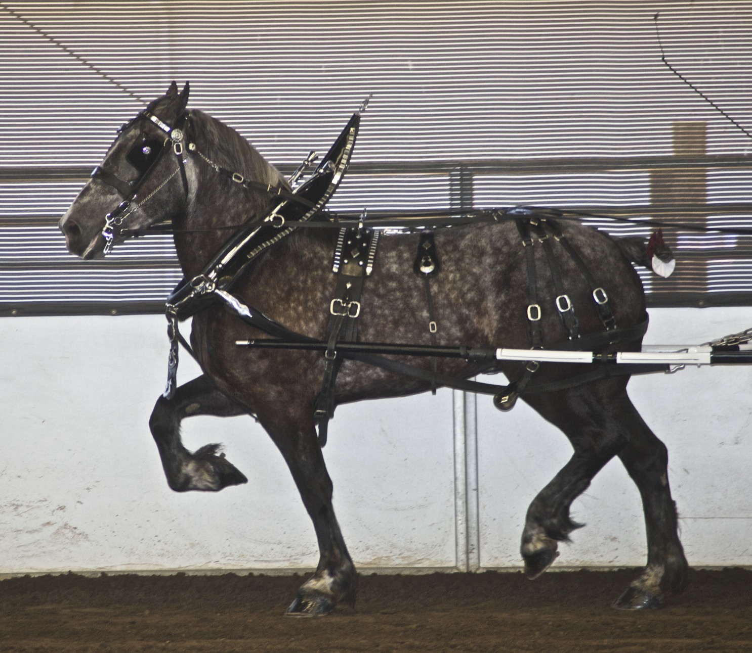 Percheron draft horse